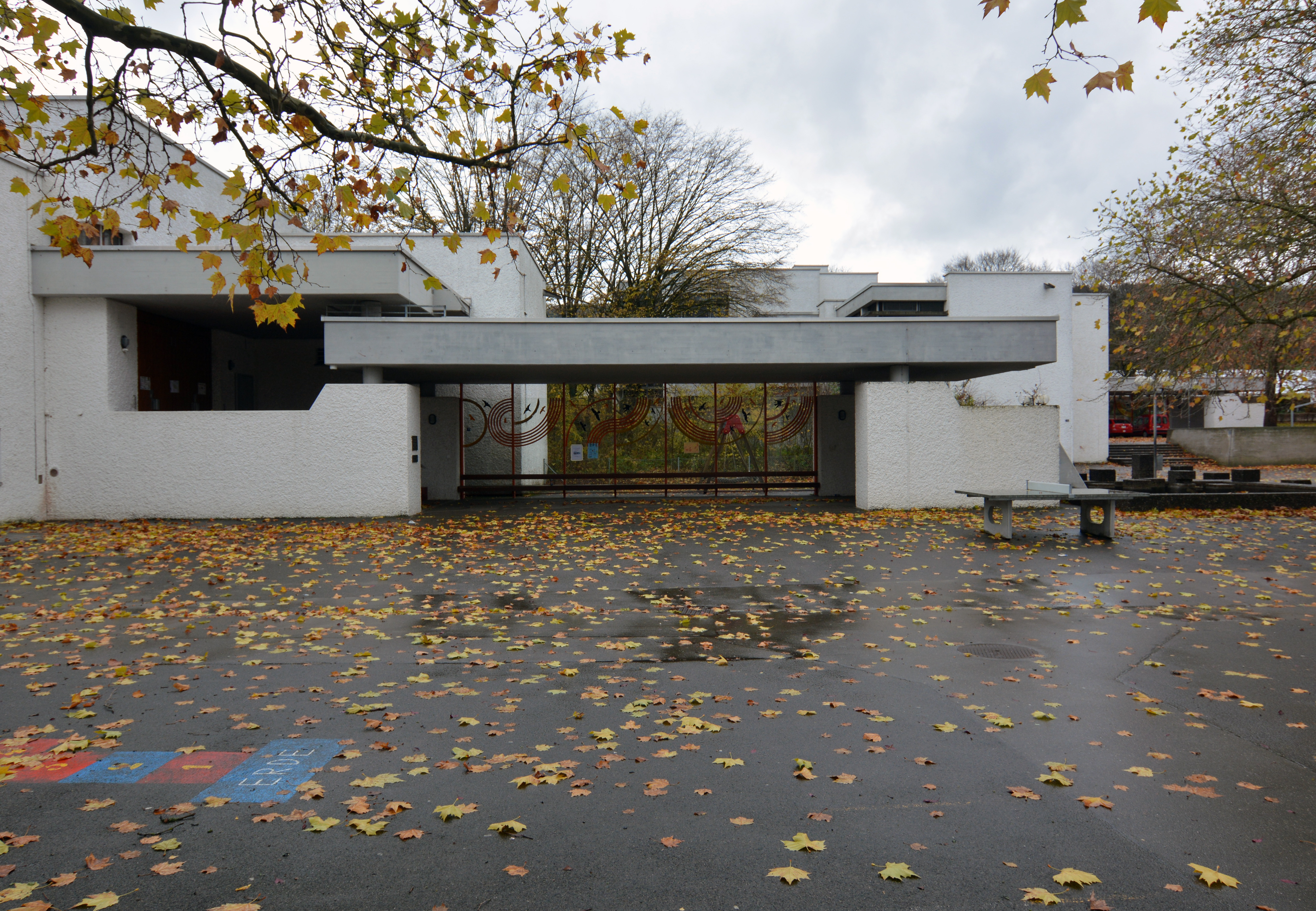 Das Primarschulhaus Im Fondli, Dietikon, 1962–65. Windfang Klassentrakt. Architekten: Rudolf und Esther Guyer